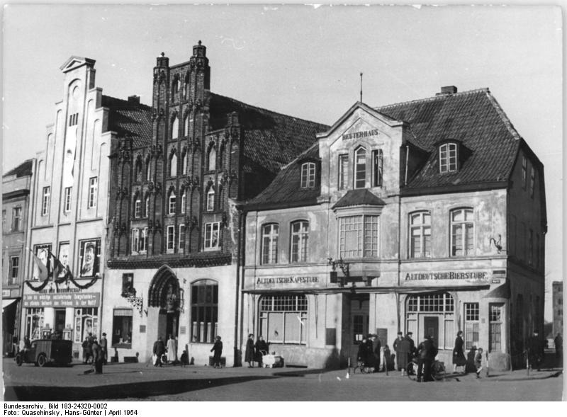 Wismar, Marktplatz, Reuterhaus Zentralbild Quaschinsky 28.4.1954 Wismar Bezirk Rostock Blick auf den Marktplatz, (rechts) das Reuterhaus, (links daneben) ein Gebäude, errichtet 1648.